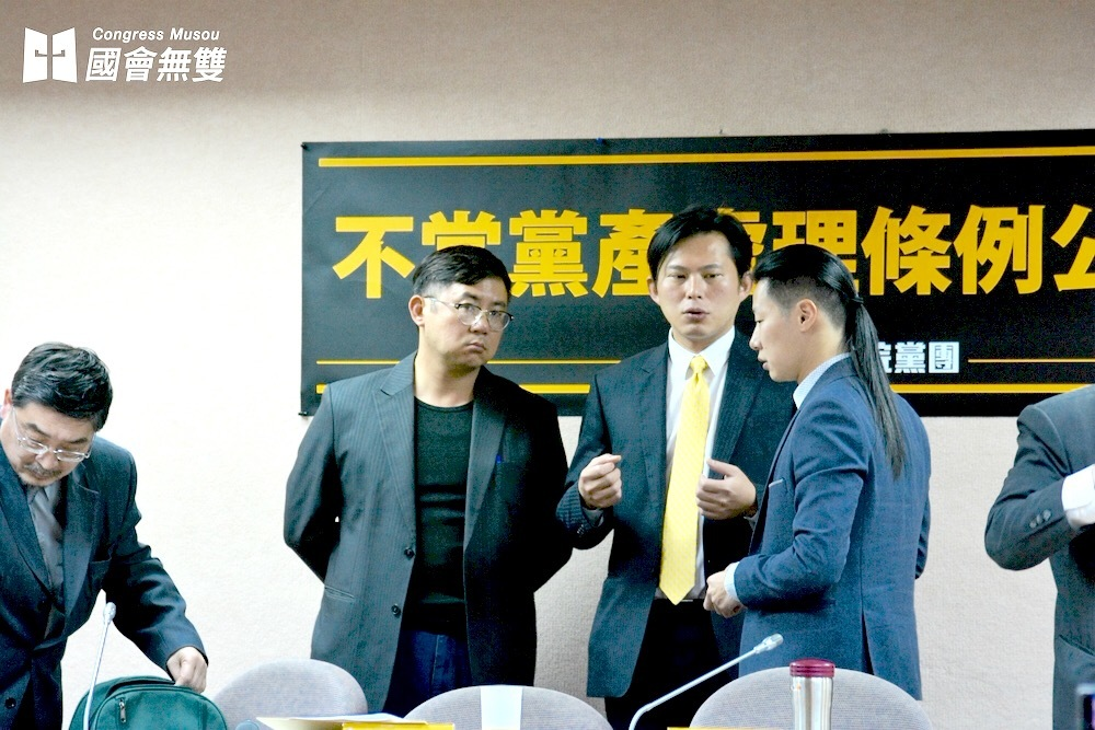 民進黨不當黨產條例14年未改 時代力量將提新版本補充